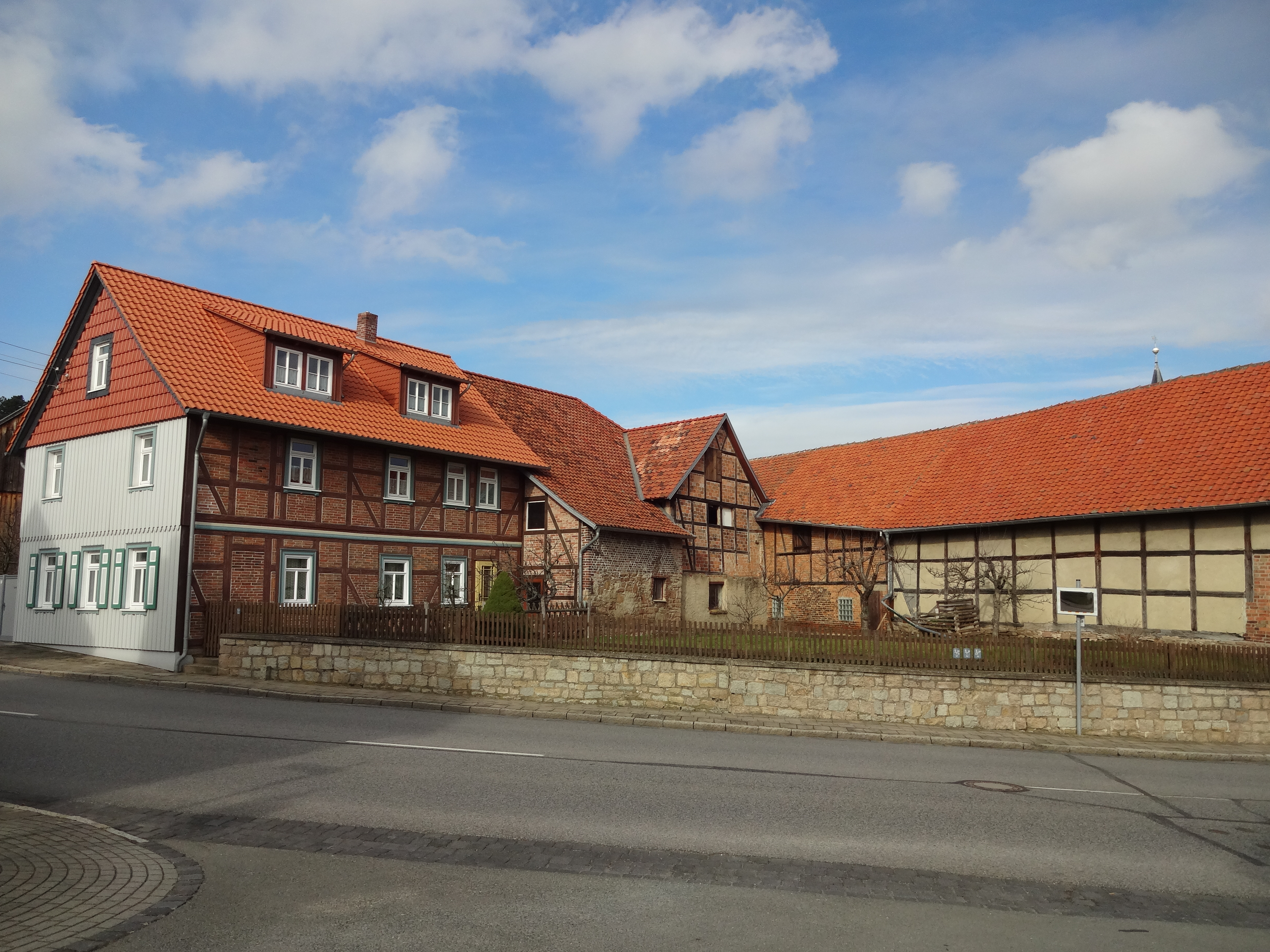 Denkmalgeschützter Bauernhof in der Wernigeröder Straße 2 in Benzingerode (Ortsteil von Wernigerode)